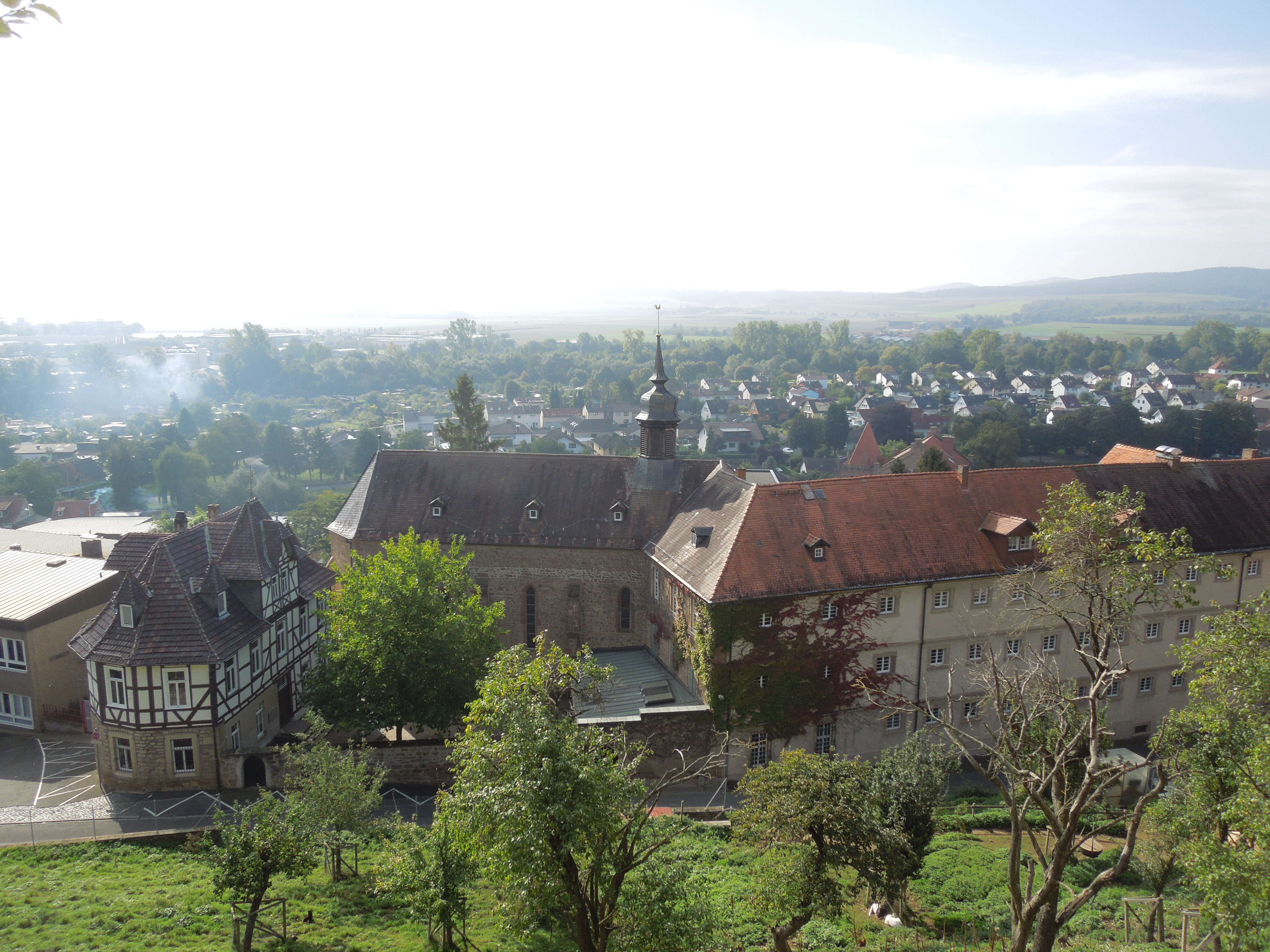 Blick vom Domhügel auf die Gebäude des ehemaligen Ursulinenklosters in Fritzlar; Schule links, Kirche Mitte, Kloster rechts.